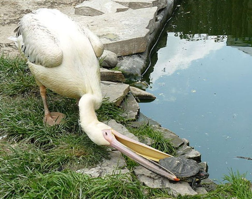 Рівненський зоопарк, м. Рівне, вул. Київська, 110